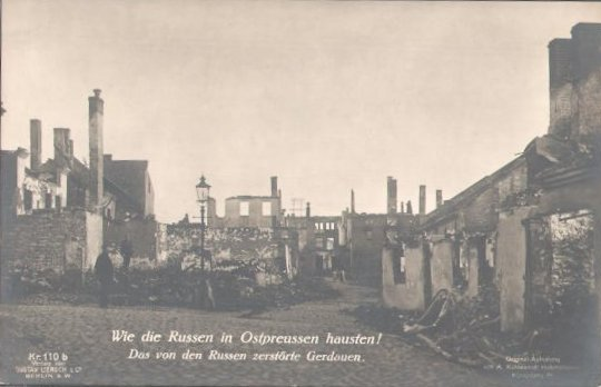 Gerdauen